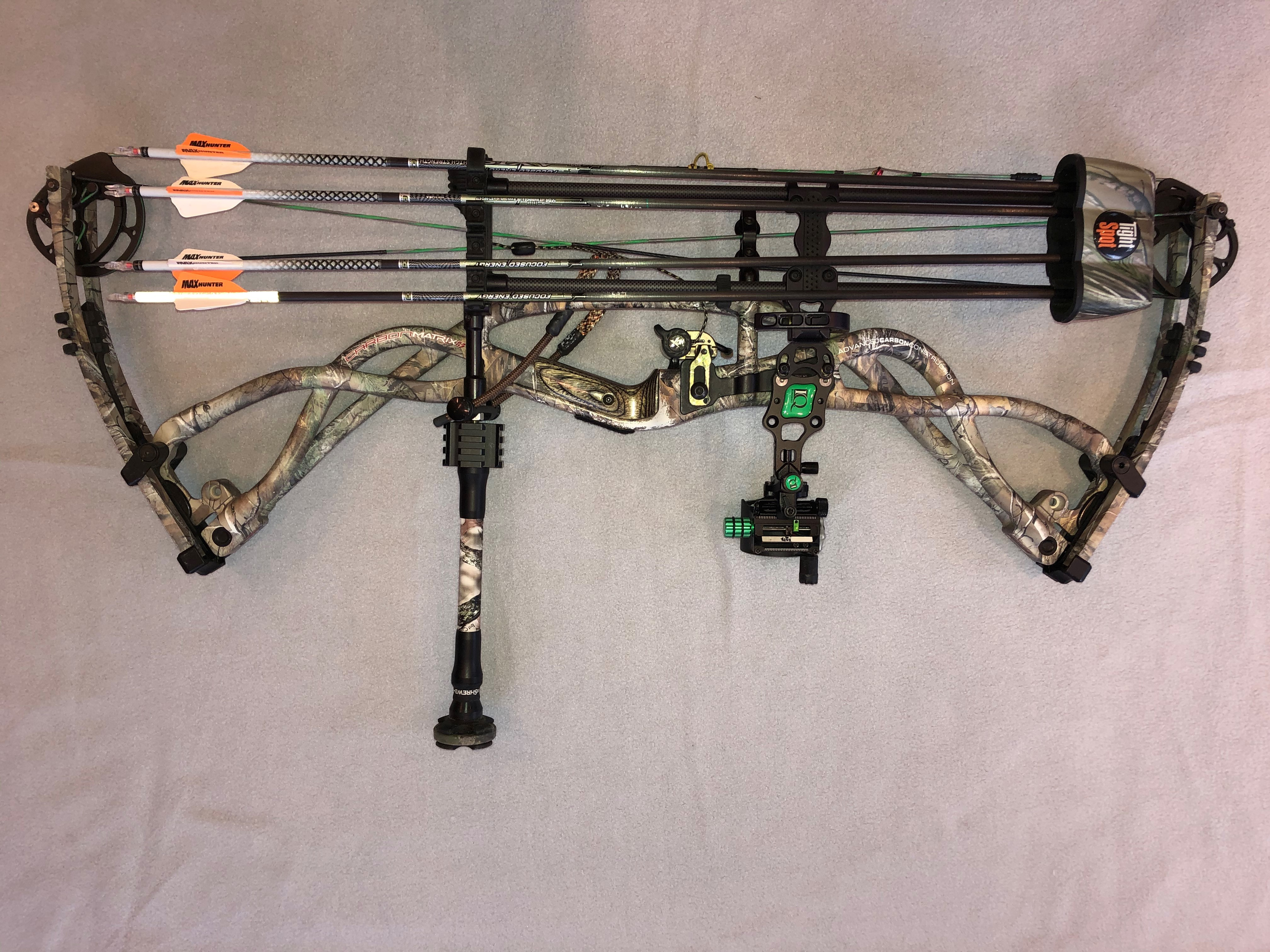 Jagd- Compound-Bogen mit Köcher